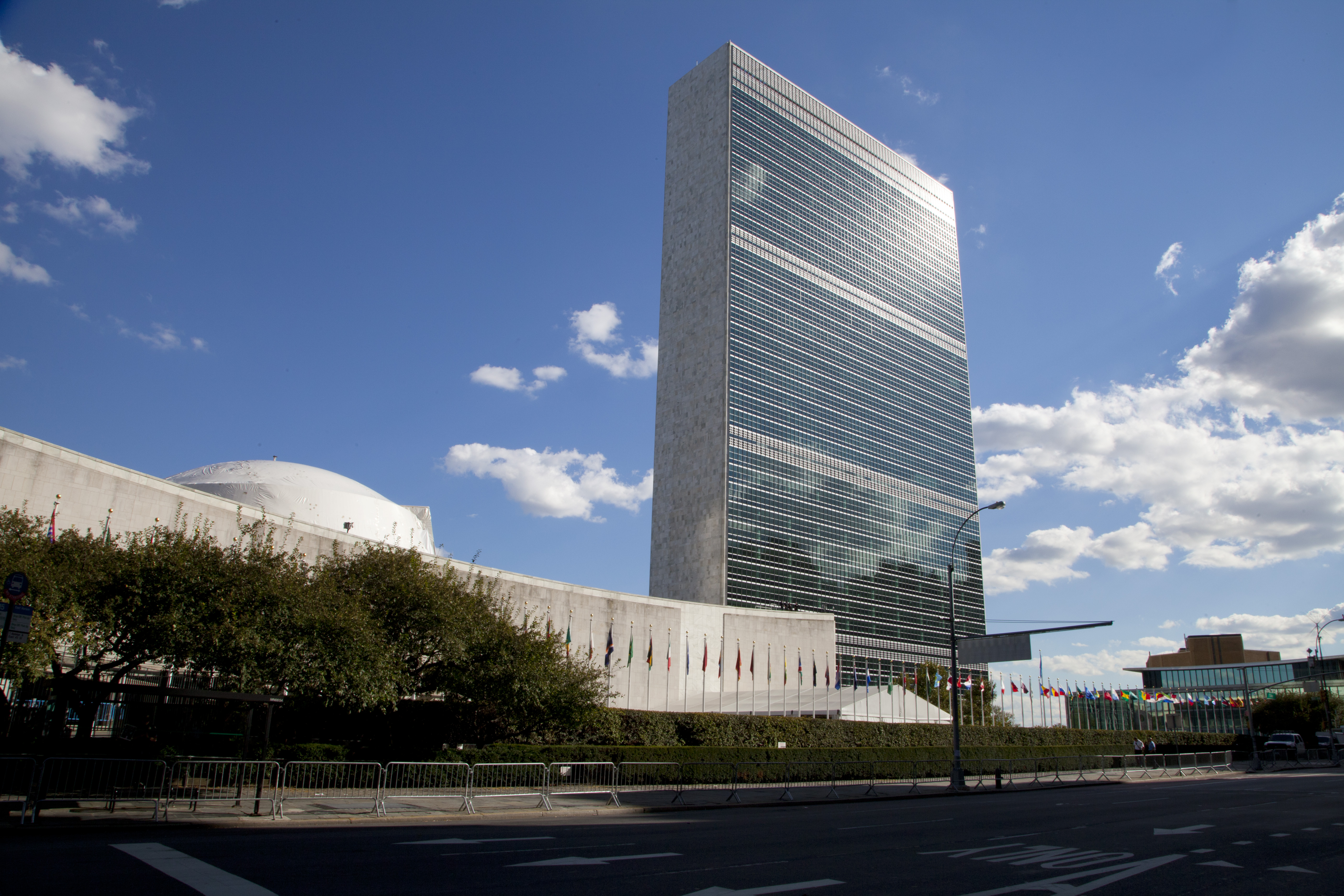 Nueva York (EEUU), 24 de septiembre 2012. La sede en Nueva York en el 67º Período de Sesiones de la Asamblea General de Naciones Unidas. Foto: Fernanda LeMarie - Ministerio de Relaciones Exteriores, Comercio e Integración.